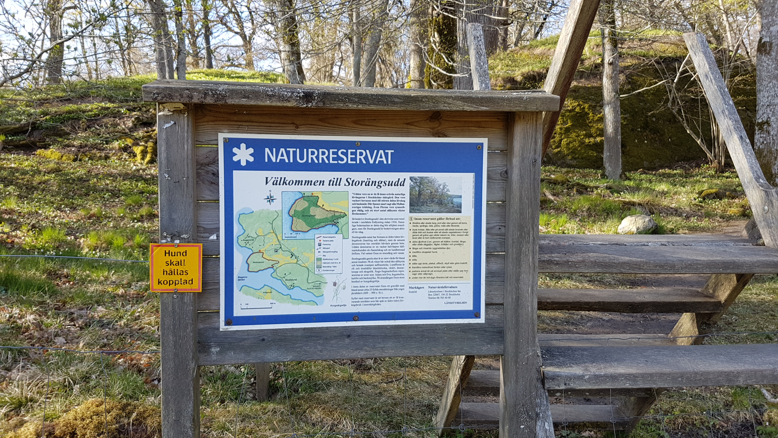 Storängsudds naturreservat